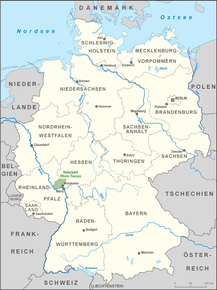 Karte des Naturparks Rhein-Taunus in Deutschland